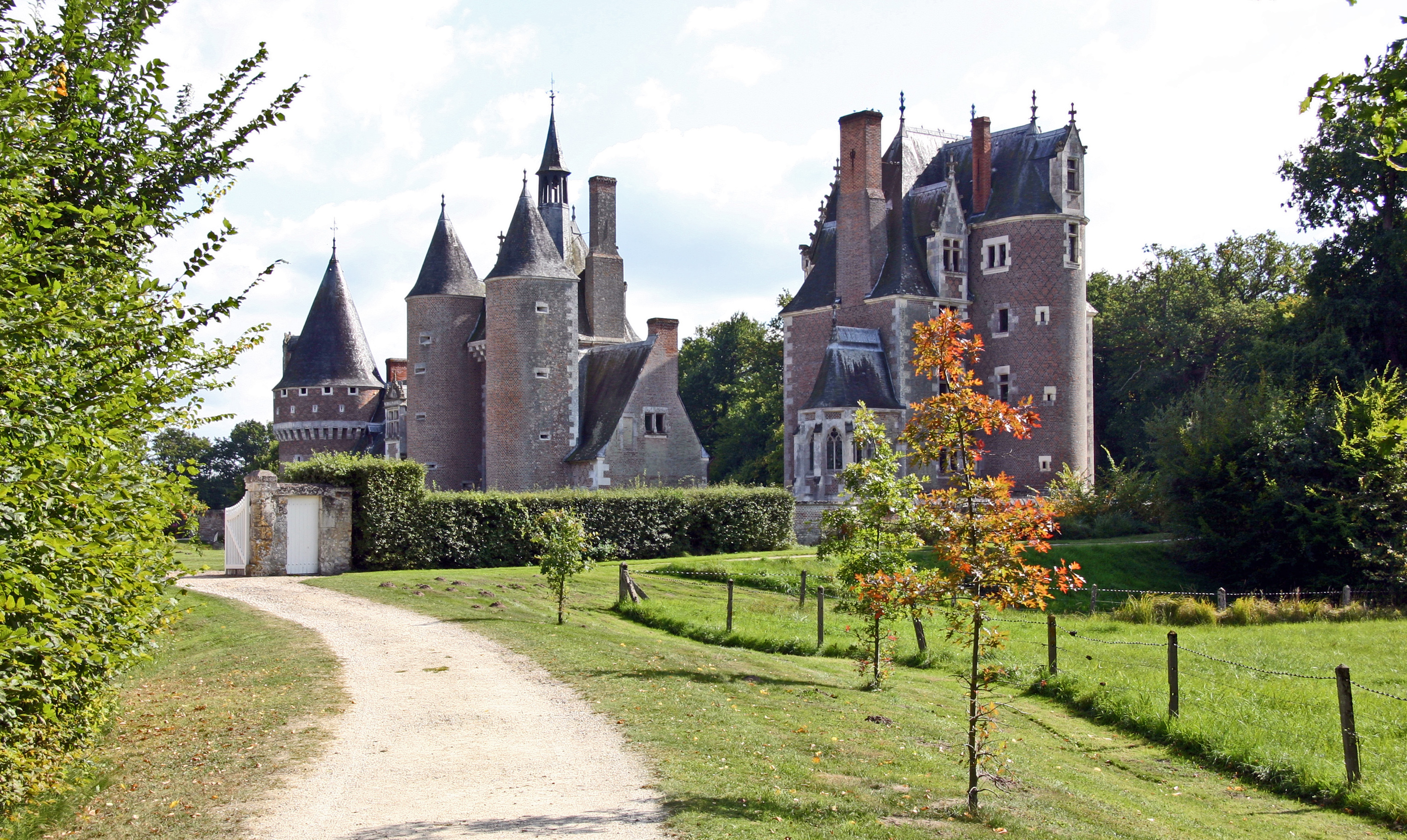 Schloss Le Moulin